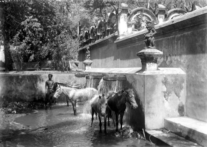 Negatief. Badplaats voor paarden bij Tedjakoela, Bali